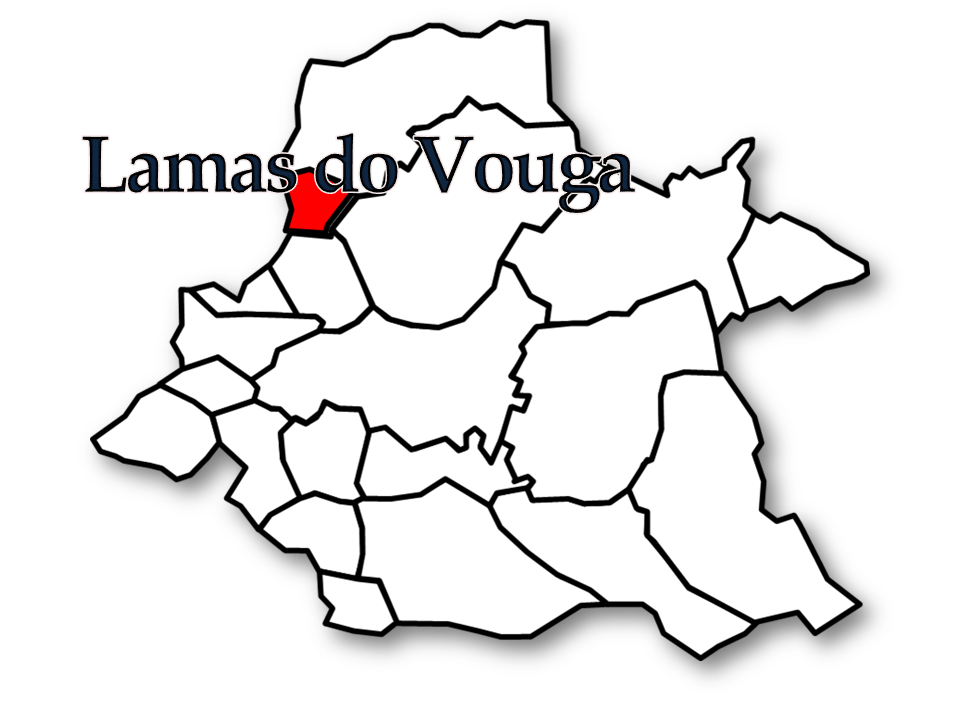 Censos 1864/2011